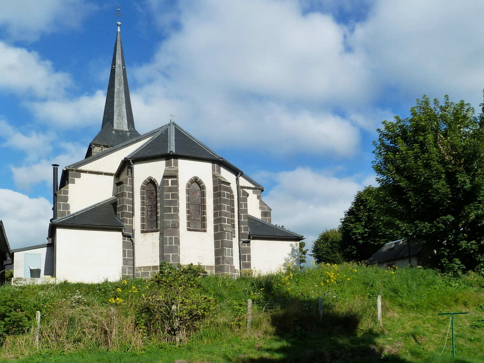 L'église dédiée à saint Georges Nébouzat, Puy-de-Dôme.- (Auvergne).- France.